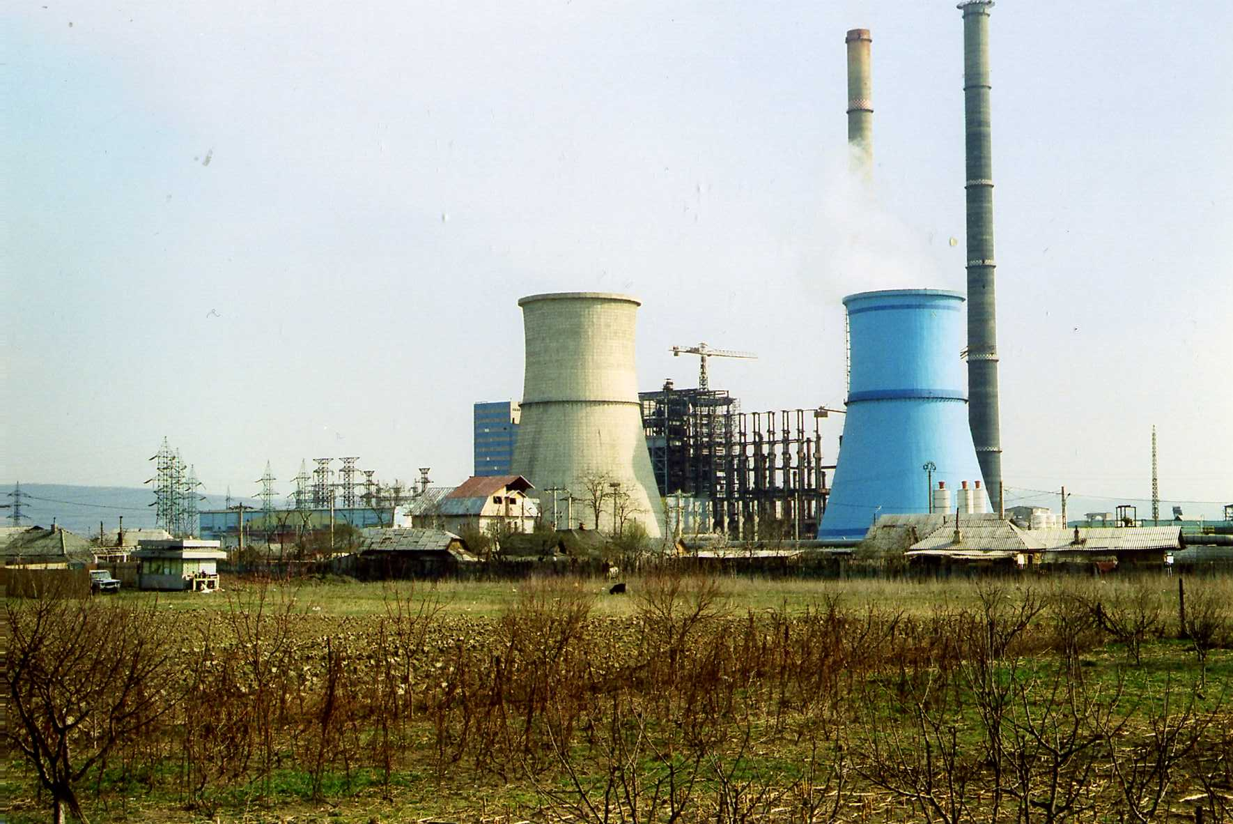 Elektrárna v Bacău, Rumunsko